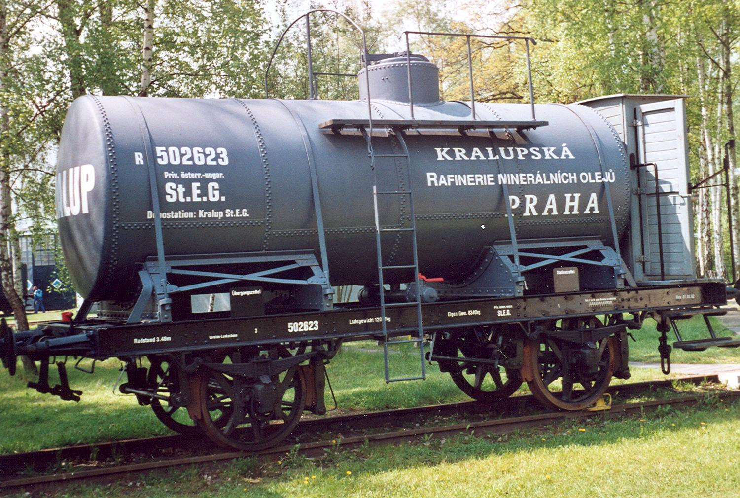 Kesselwagen der St.E.G.